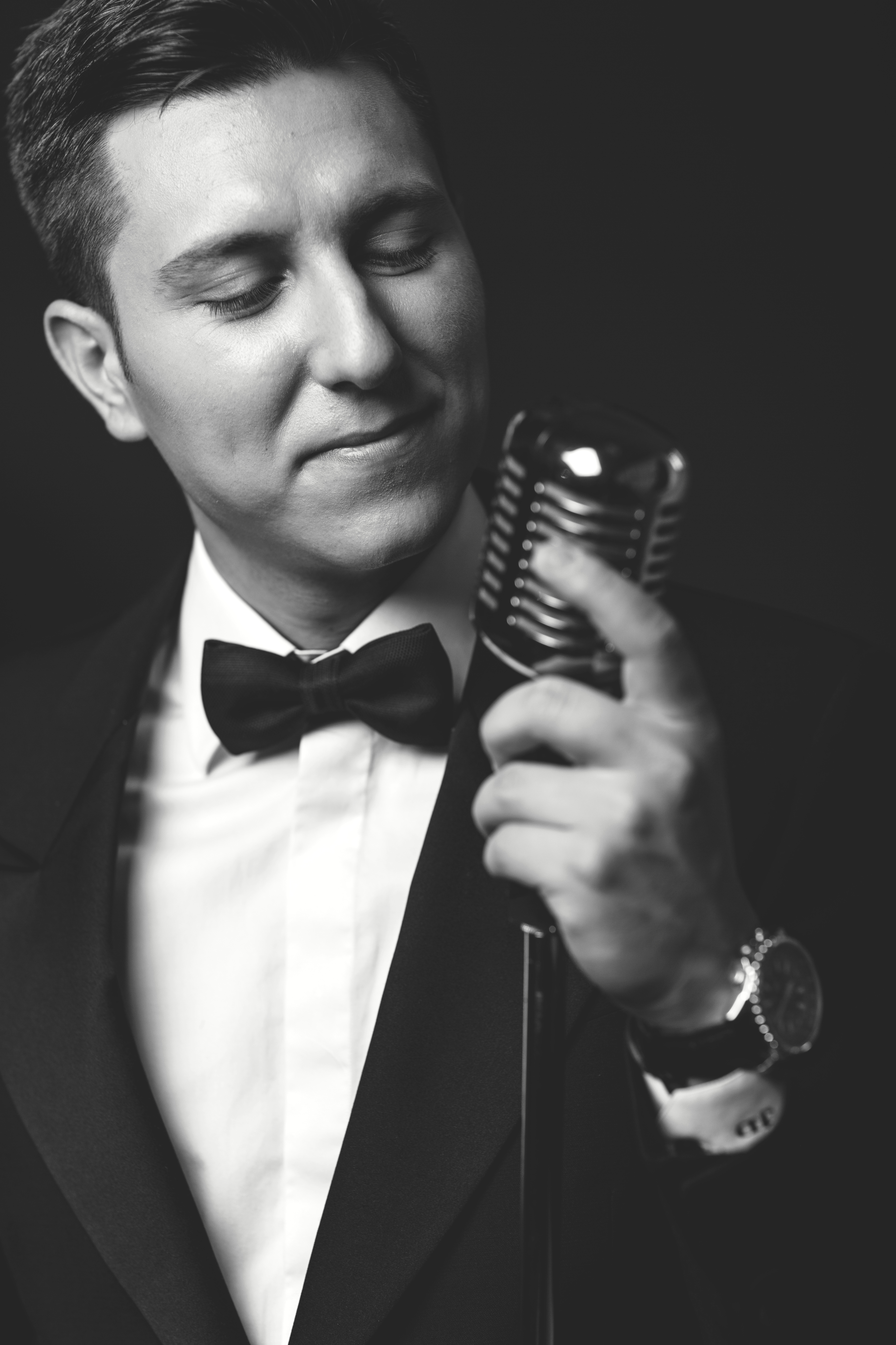 Srpskohrvatski / српскохрватски: 2017